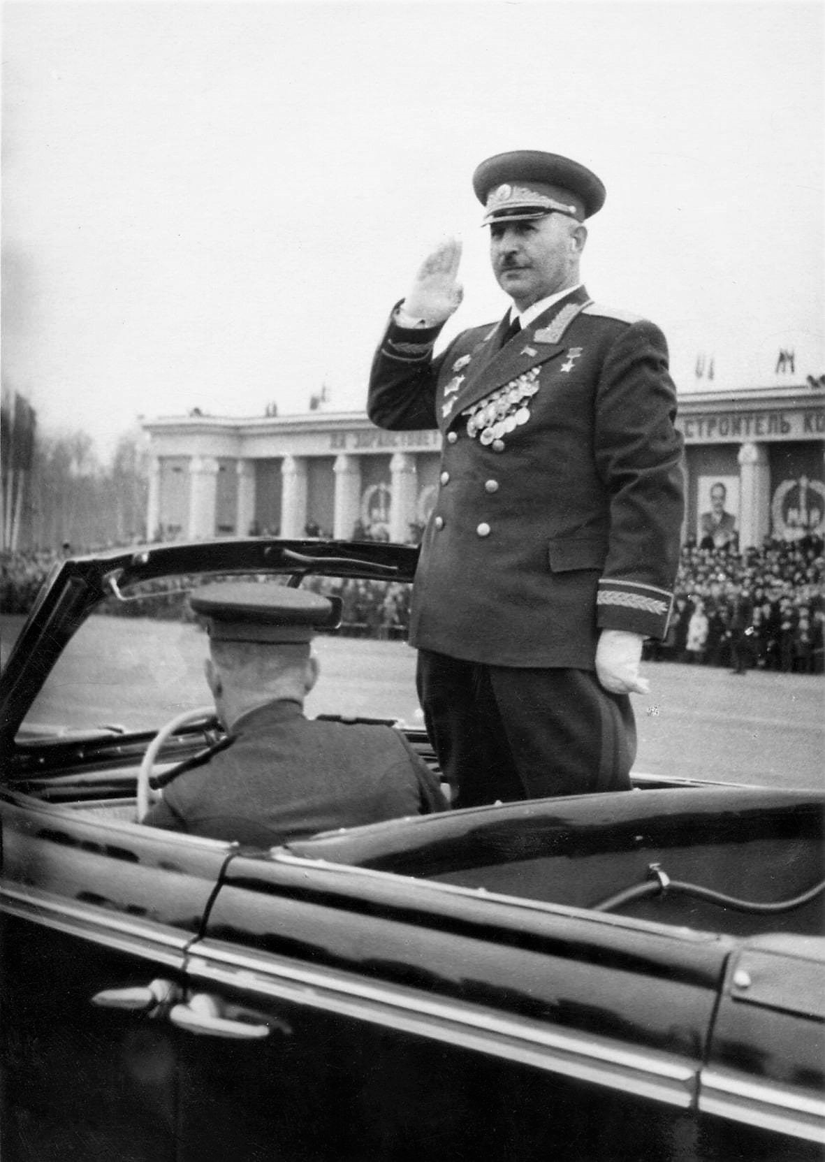 Герой Советского Союза генерал армии И.Х. Баграмян в Риге